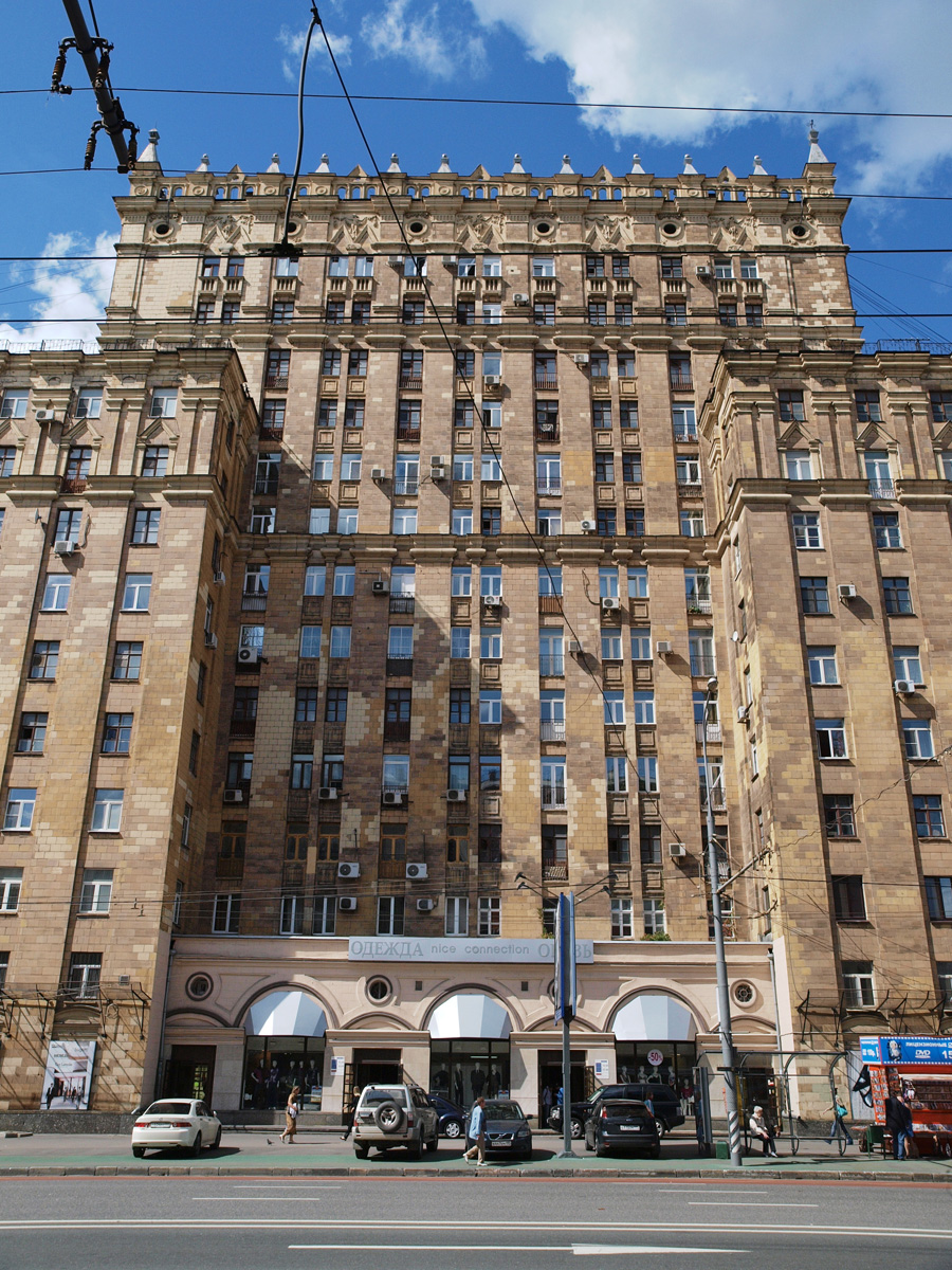 49, Prospekt Mira, Moscow.